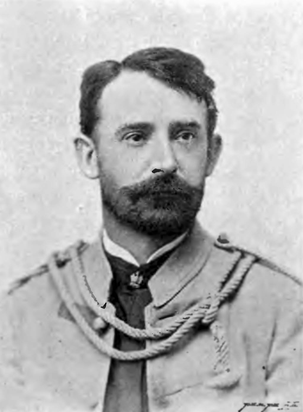 Архітектор Теодор Тальовський (1857—1910) в костюмі польського "Сокола".